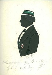 Silhouette von Bernhard Kaeswurm († 1890), Rittergutsbesitzer auf Groß Kindschen, Ostpreußen